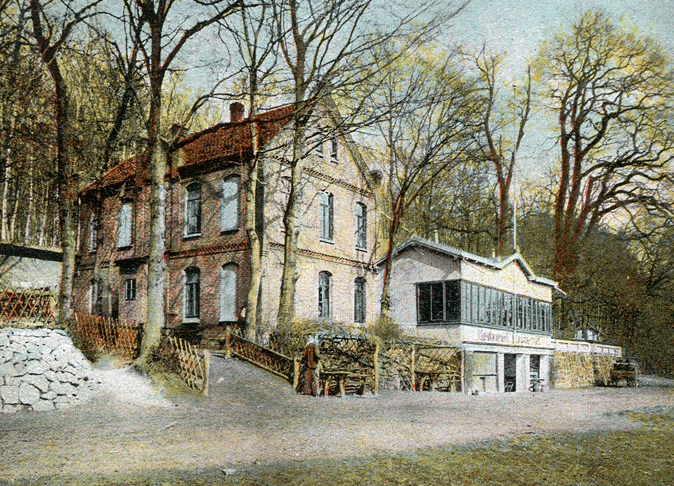 Diese Lithographie mit einem Gruß vom Benther Berg bei Hannover und dem Gastromom Ernst Rehbock vertrieb der '"Verlag Hartwig & Vogel's Automaten, Berlin um 1900 ...